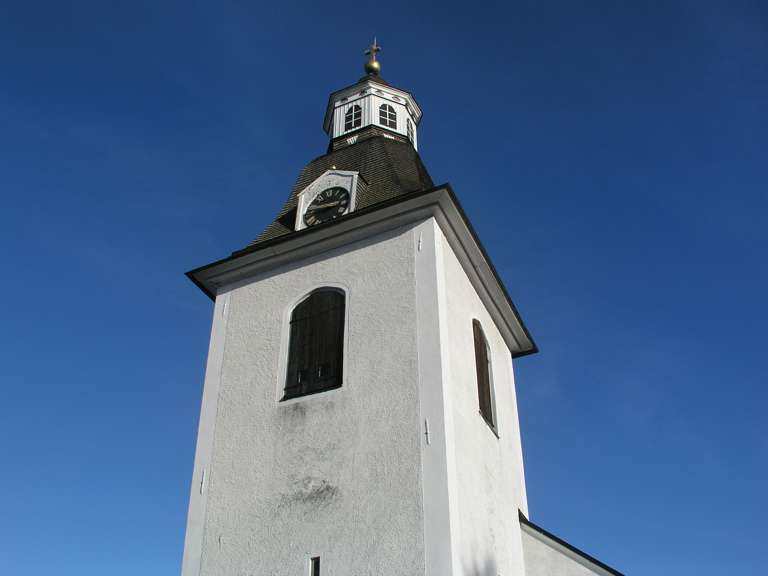 Västerlösa kyrka / Västerlösa church. Diocese of Linköping, Sweden. Linköping. The photo was taken the 26 October 2003 by Håkan Svensson (Xauxa).